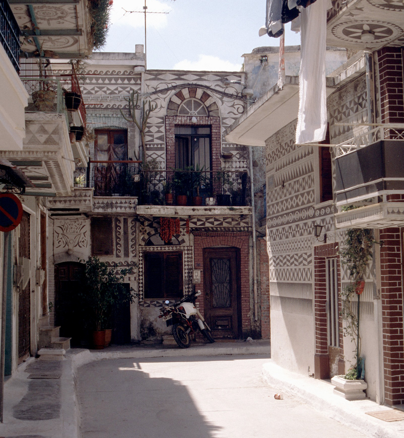 Gasse in Pyrgi auf der Insel Chios. Der zu den Mastichochoria („Mastixdörfern“) gehörende Ort ist stark durch die in Sgraffito-Technik gestalteten Häuserfassaden geprägt.